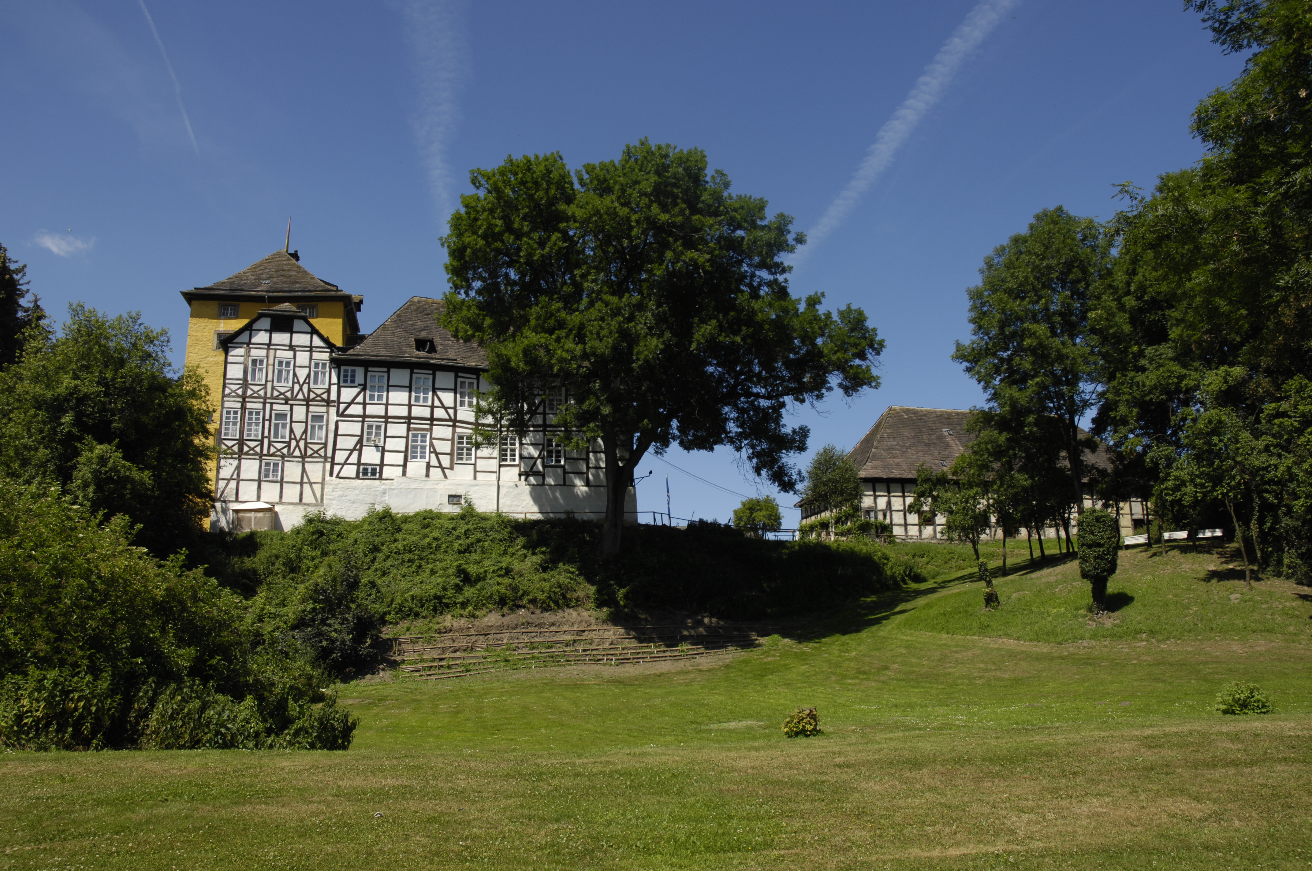 Tonenburg bei Höxter-Albaxen, Flussseite, Blick von der Weser her